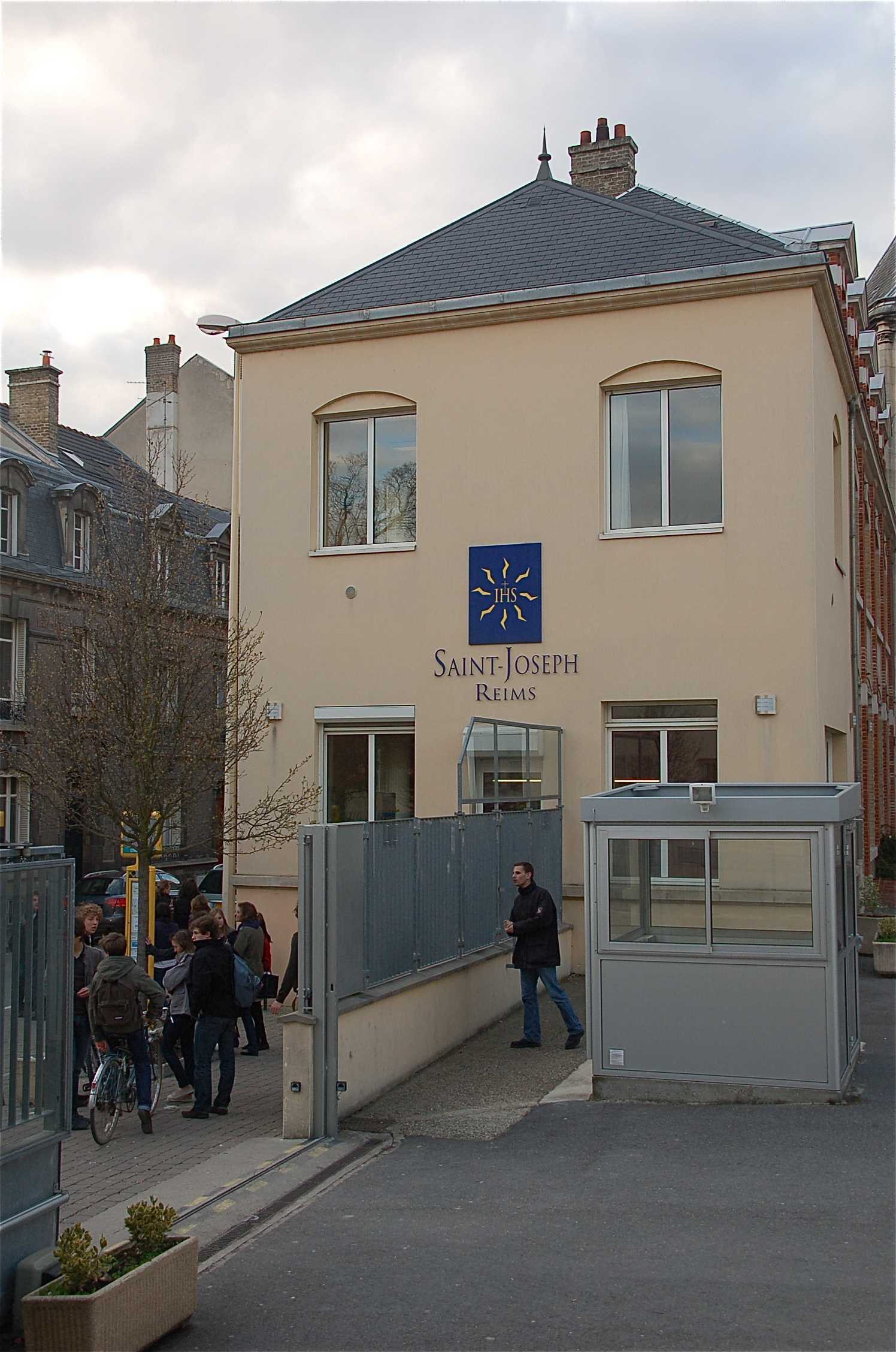 Entrée de Saint-Joseph de Reims, située 177 rue des Capucins